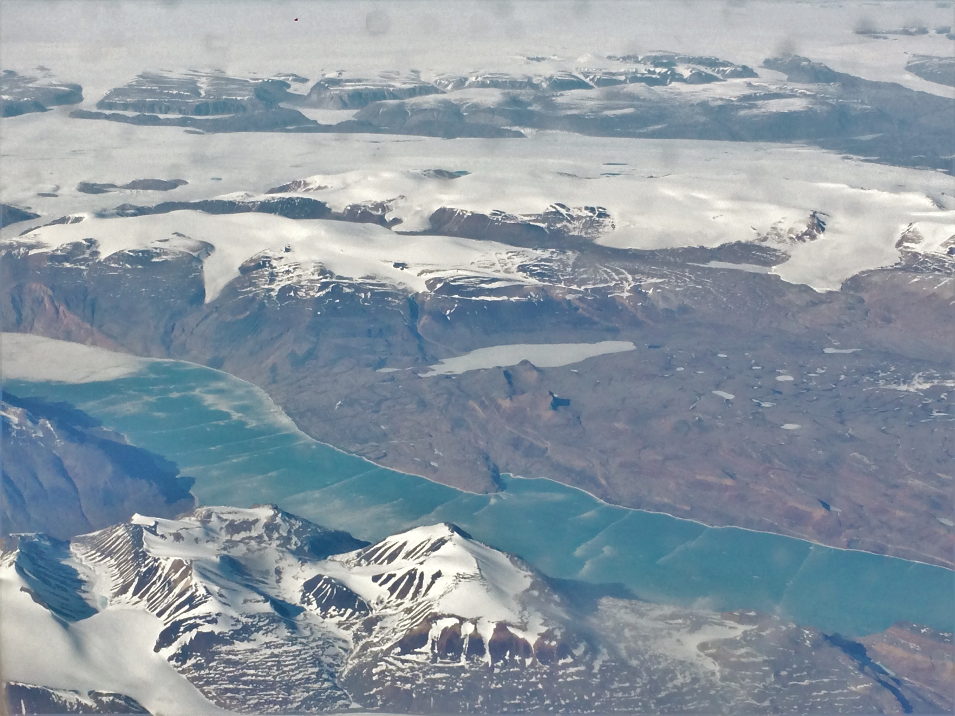 Fiordo Geologfjord